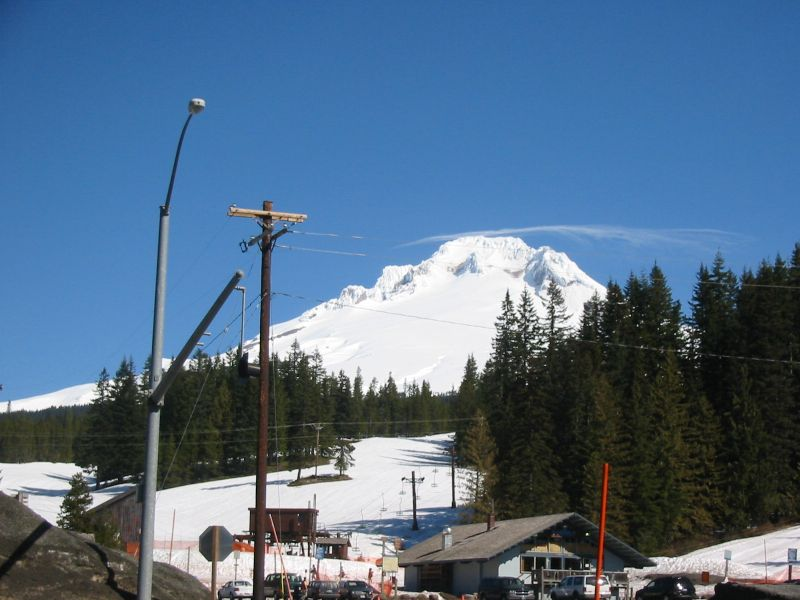 Mt. Hood